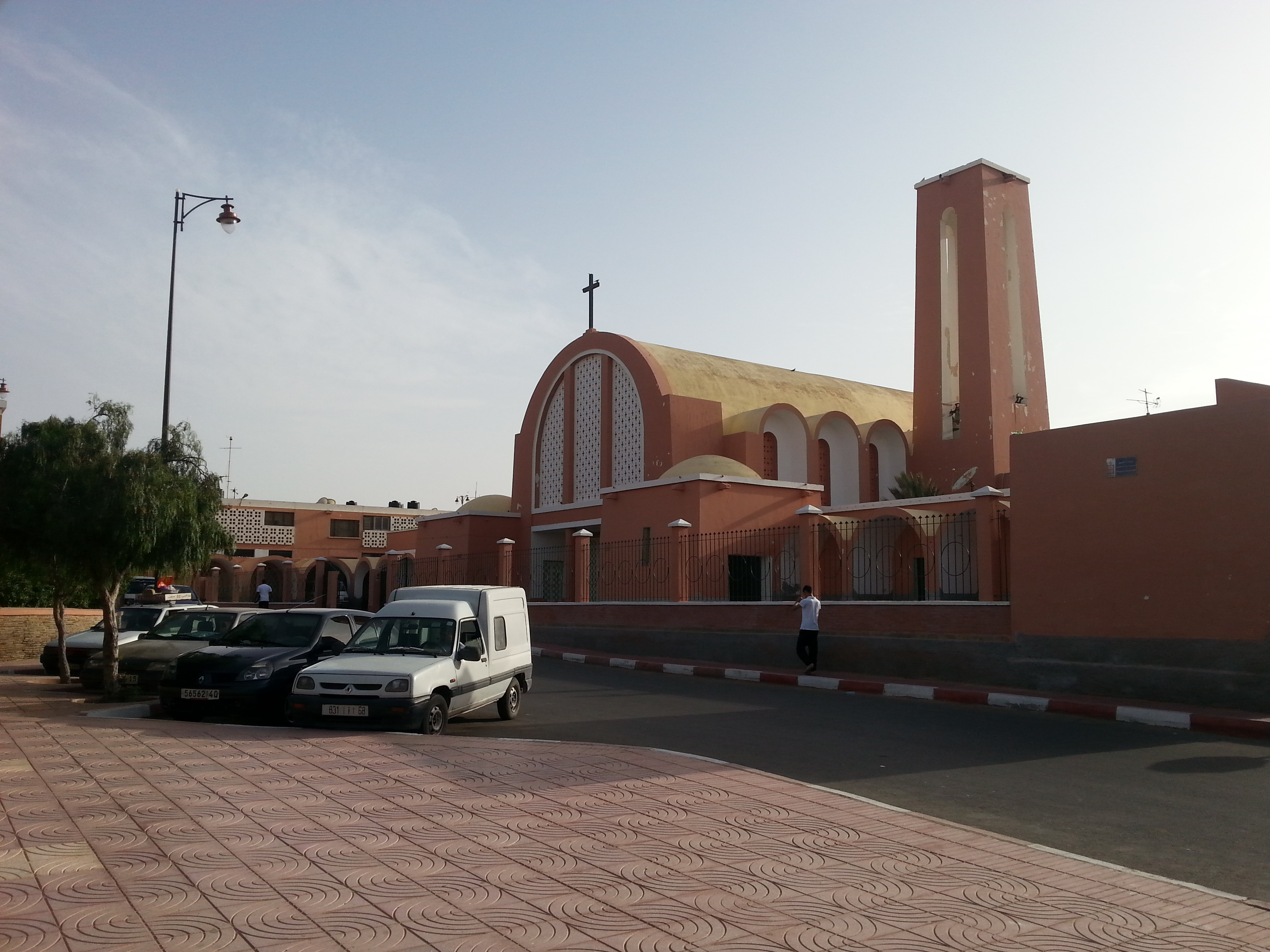 La façade principale